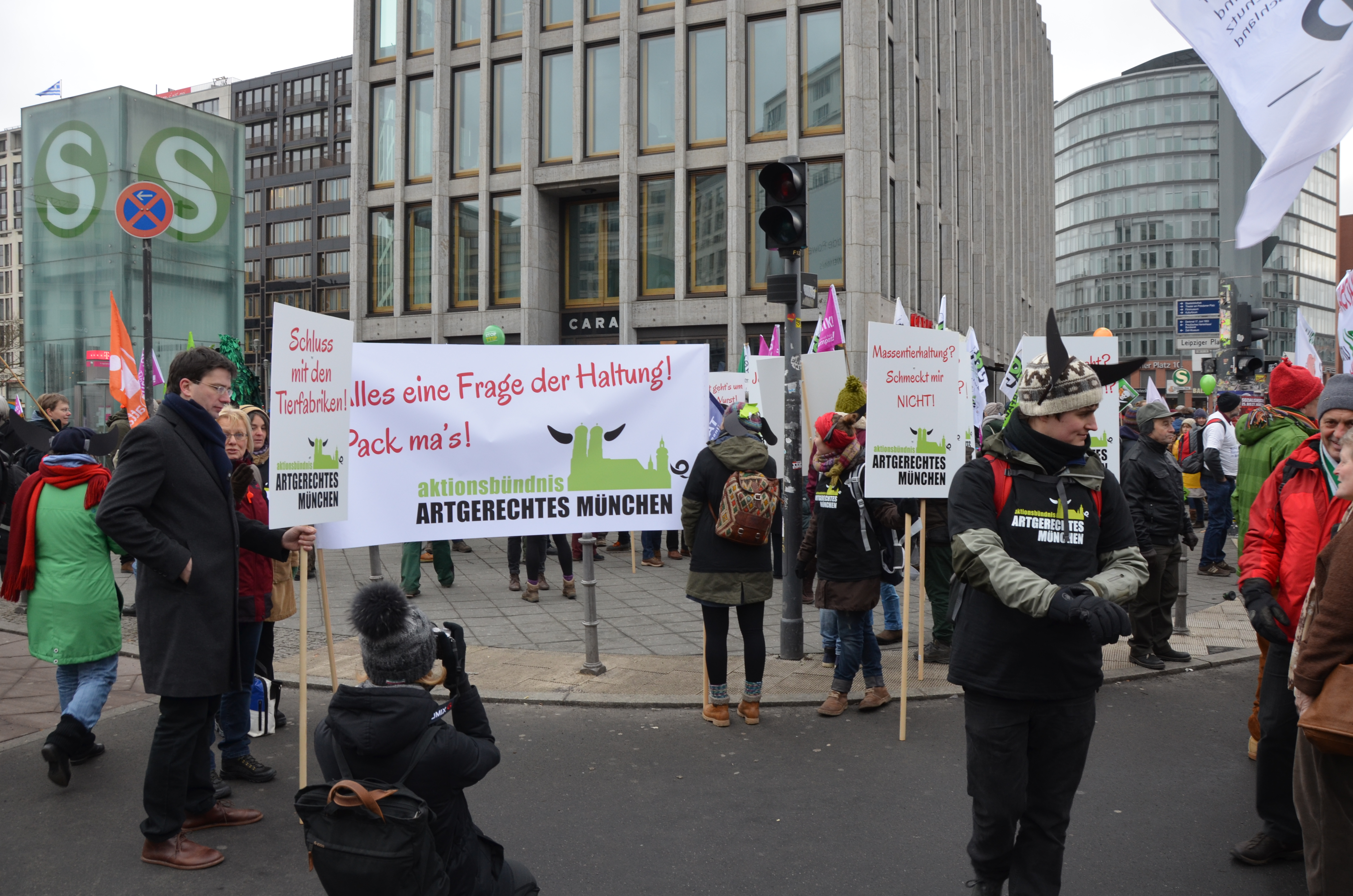 Wir haben es satt! (2016, Demomobile)